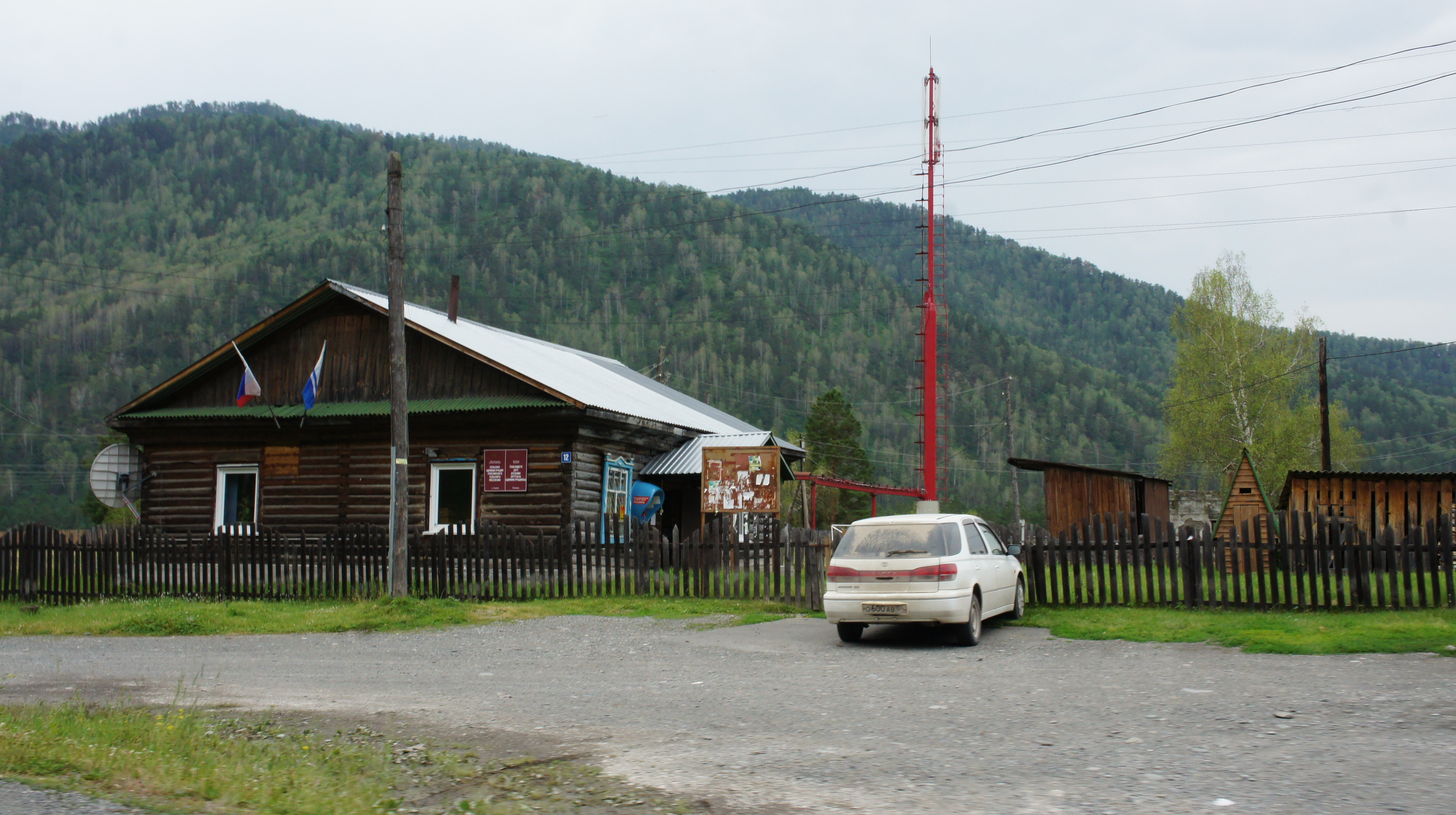 Здание администрации Узнезинского сельского поселения